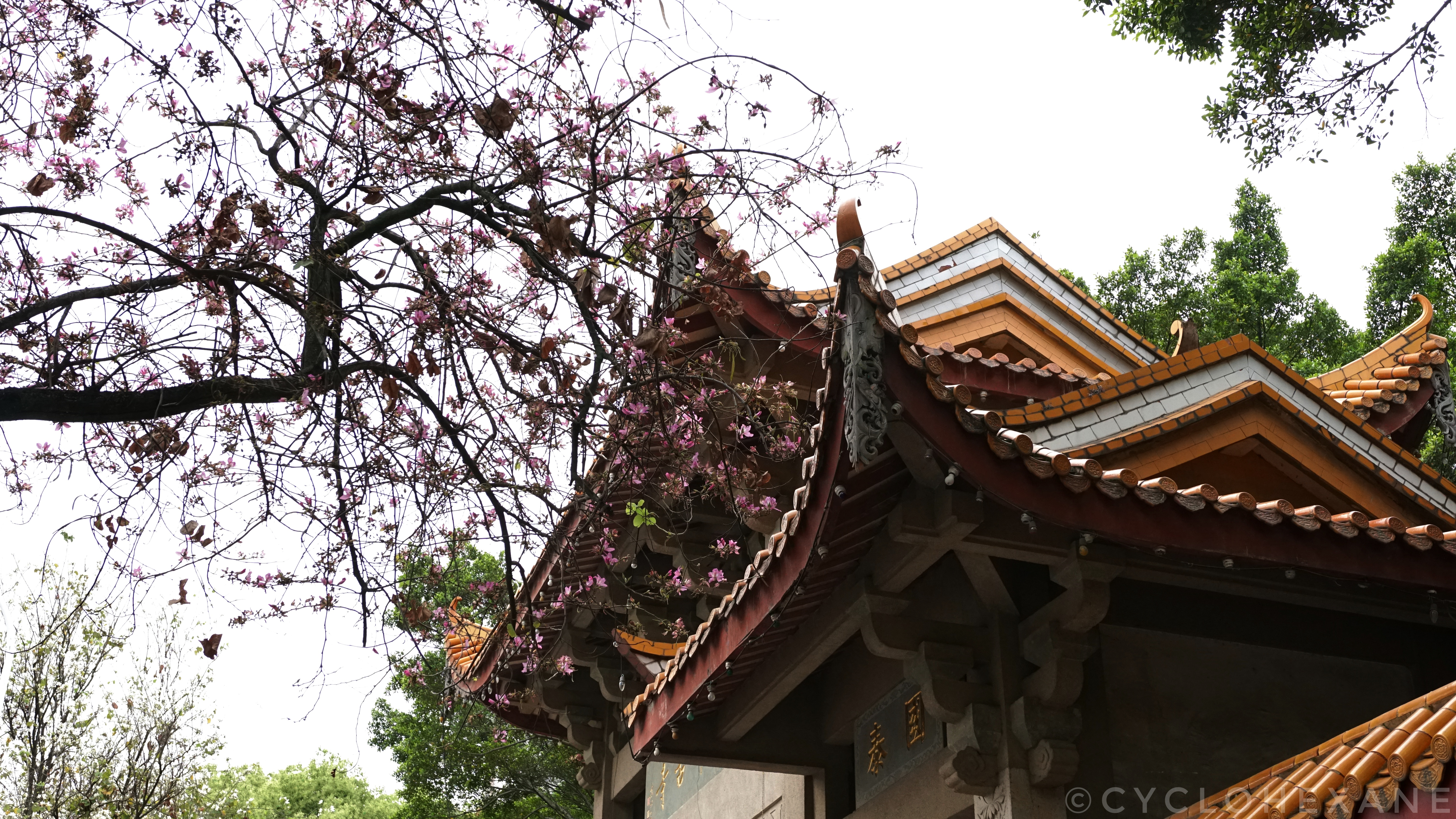 福州工业路羊蹄甲和西禅寺